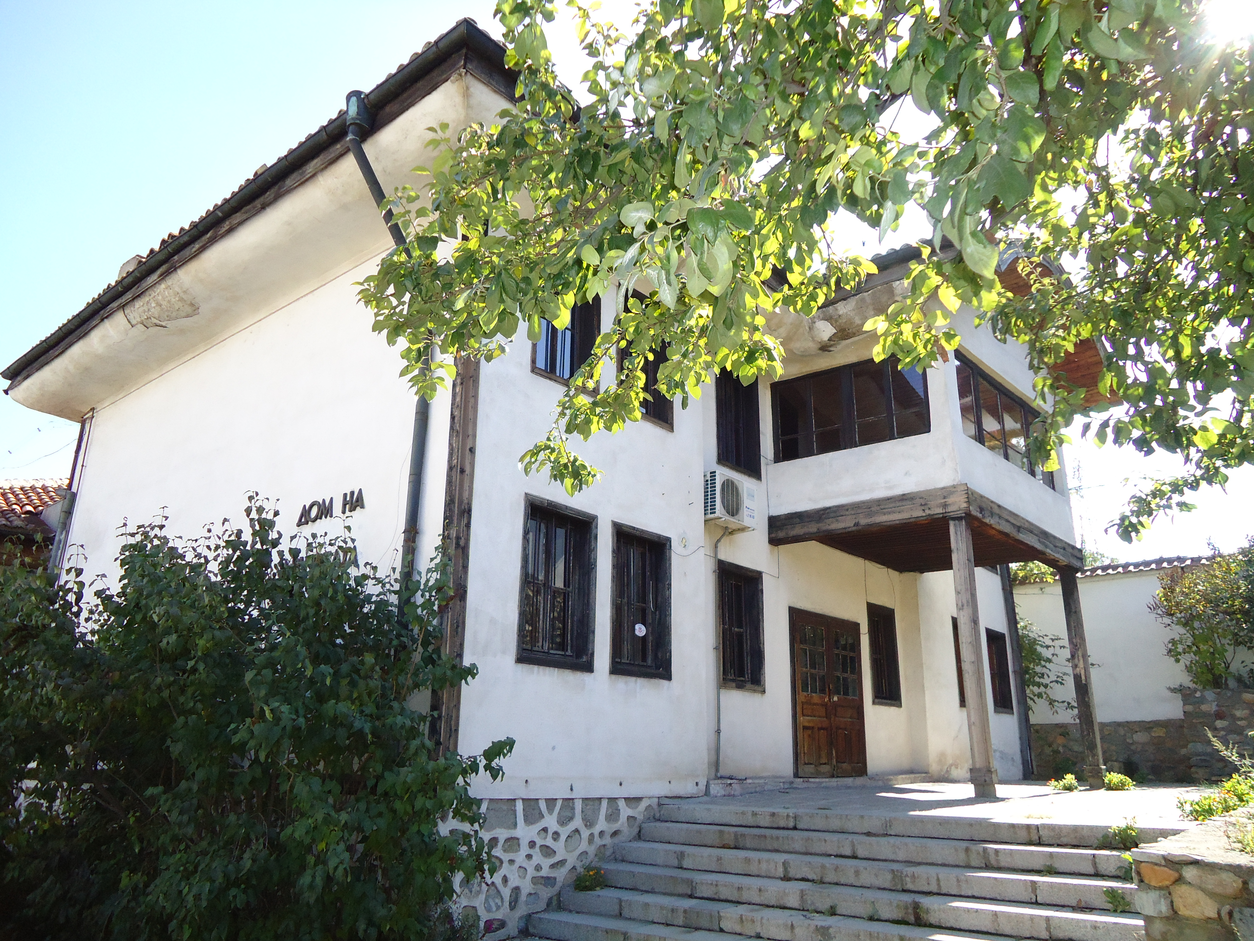 Къщата на Костандий Беровски в гр.Кюстендил